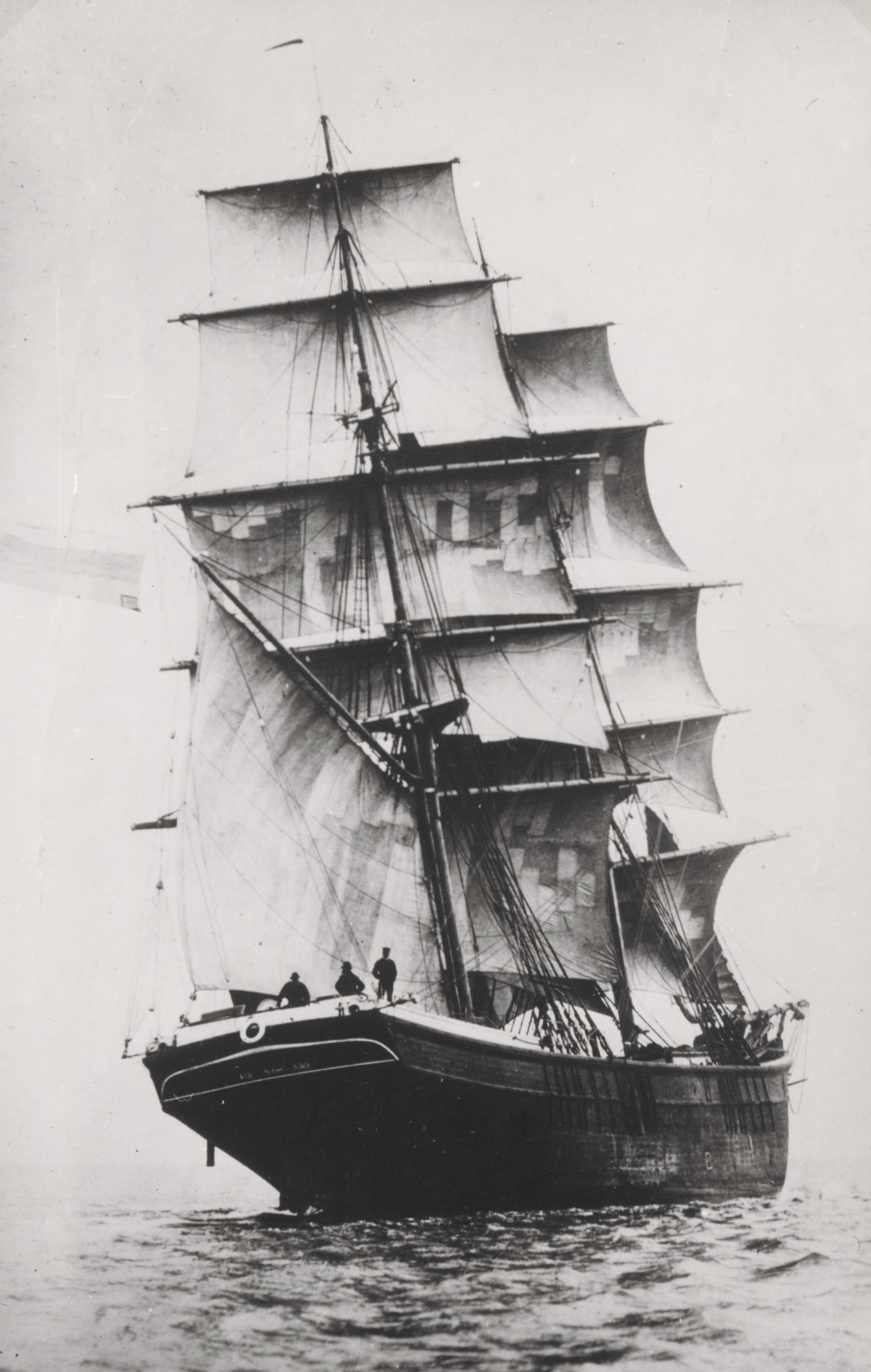 Briggen Aid (1873-1899). 279 rt, byggd 1873 på Thoras varvet. AGS var påmönstrat på Aid såsom konstapel under tiderna 28.4–6.11.80 och 12.5.81–17.11.82.